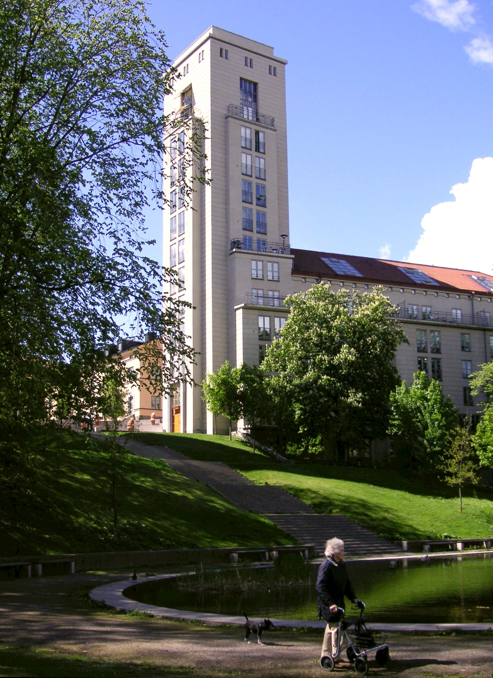 S.t Eriks bostadsområde på Kungsholmen i Stockholm 2006